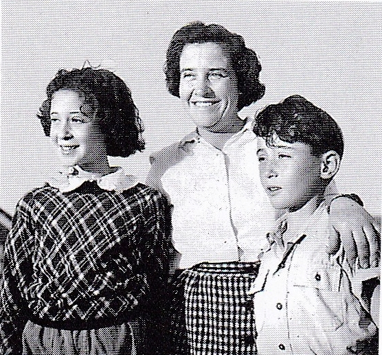 חולדה קמפניינו וילדיה בקבוצת יבנה 1952 (תשי"ב) (מתוך: "לדור אשר לא ידע" )